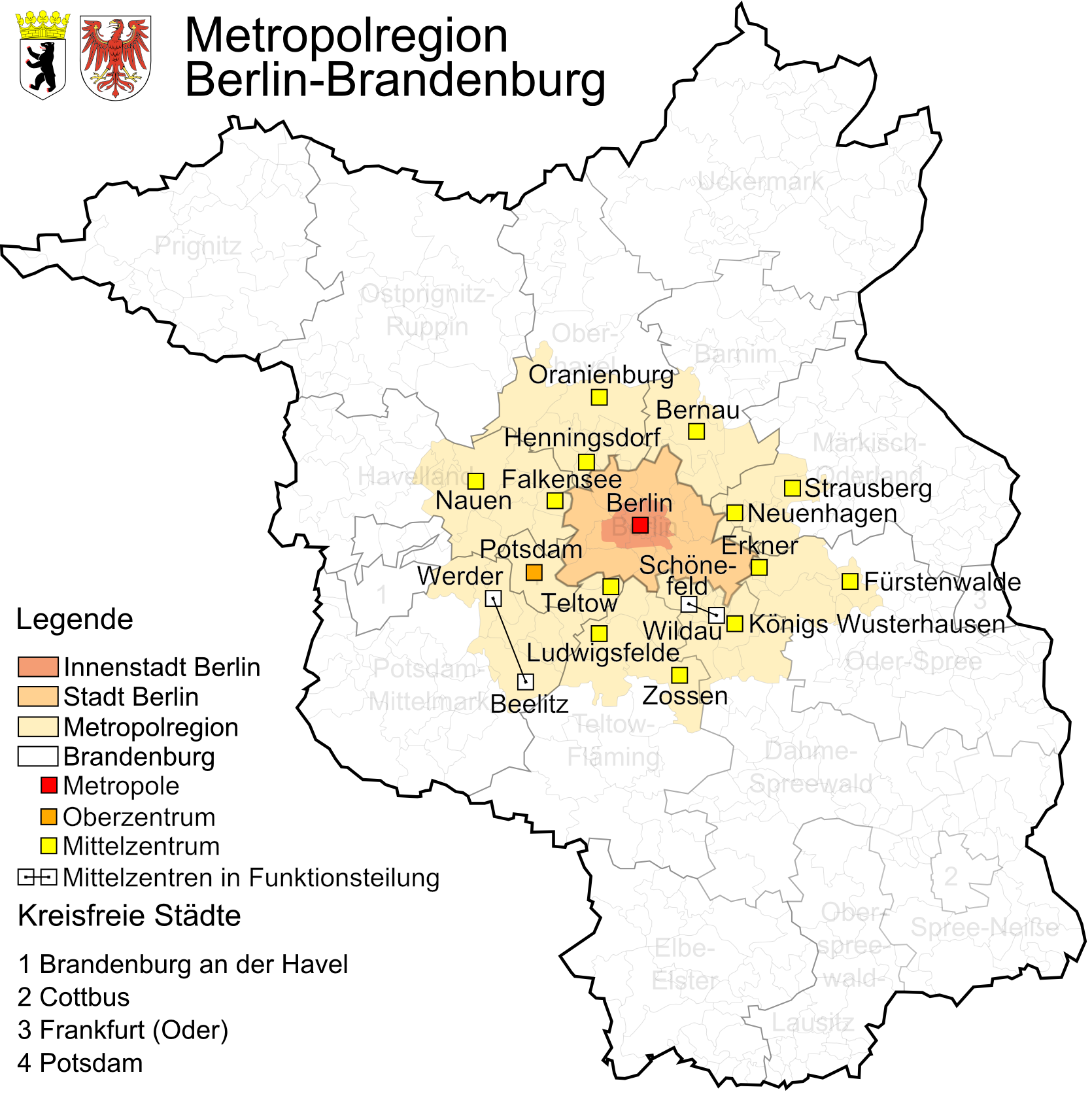 Städte in der Metropolregion Berlin-Brandenburg